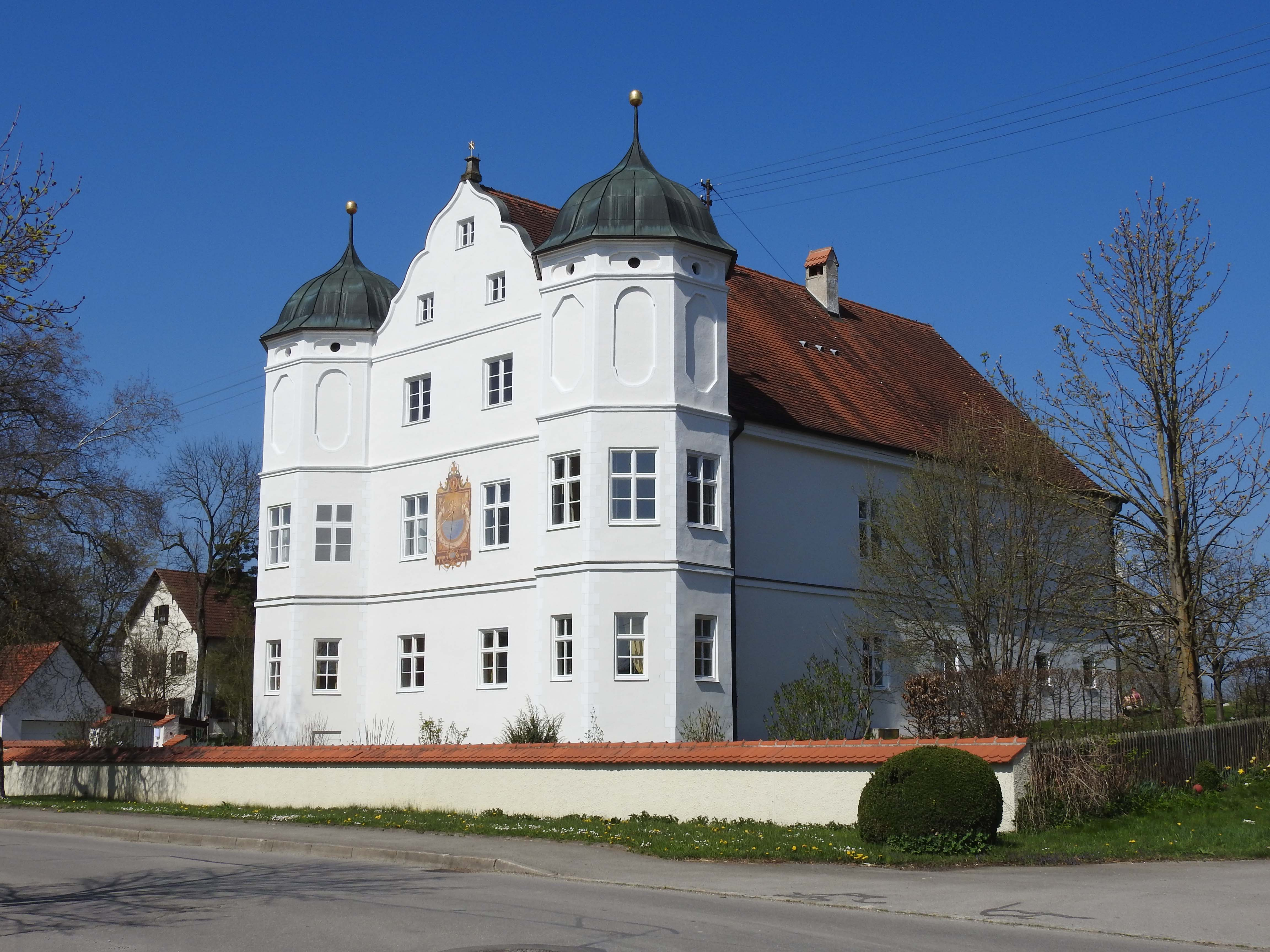 Ehem. Schloss in Holzhausen bei Buchloe, Igling